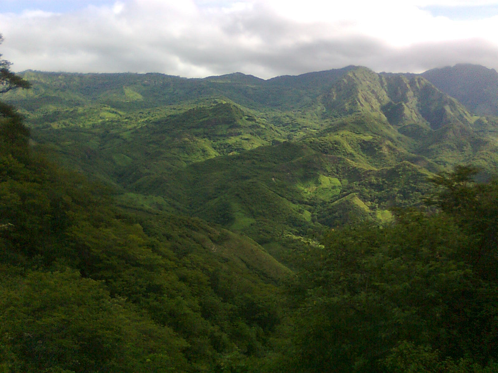 Relieve ondulado